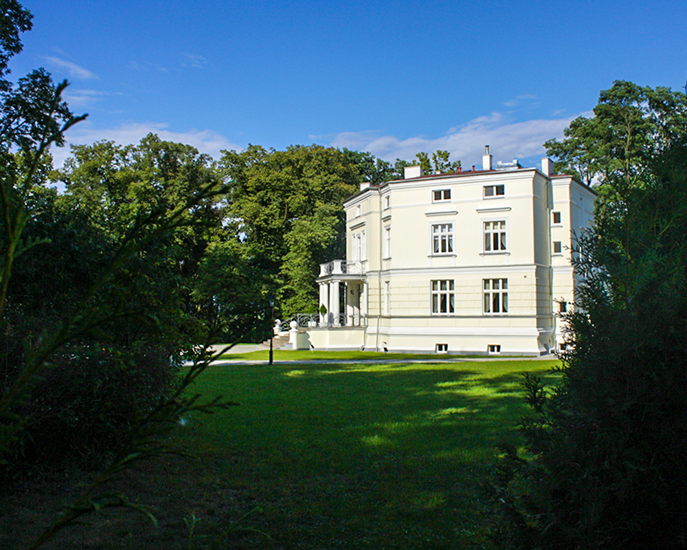 Boczna Elewacja pałacu w Młodocinie